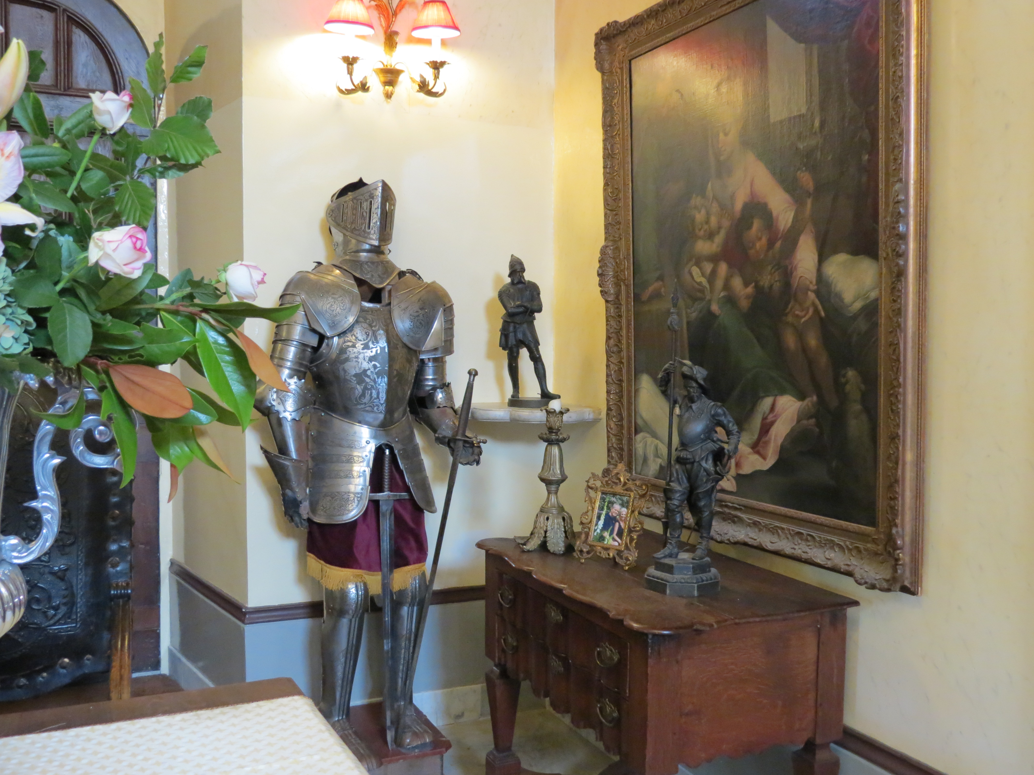 Harnas